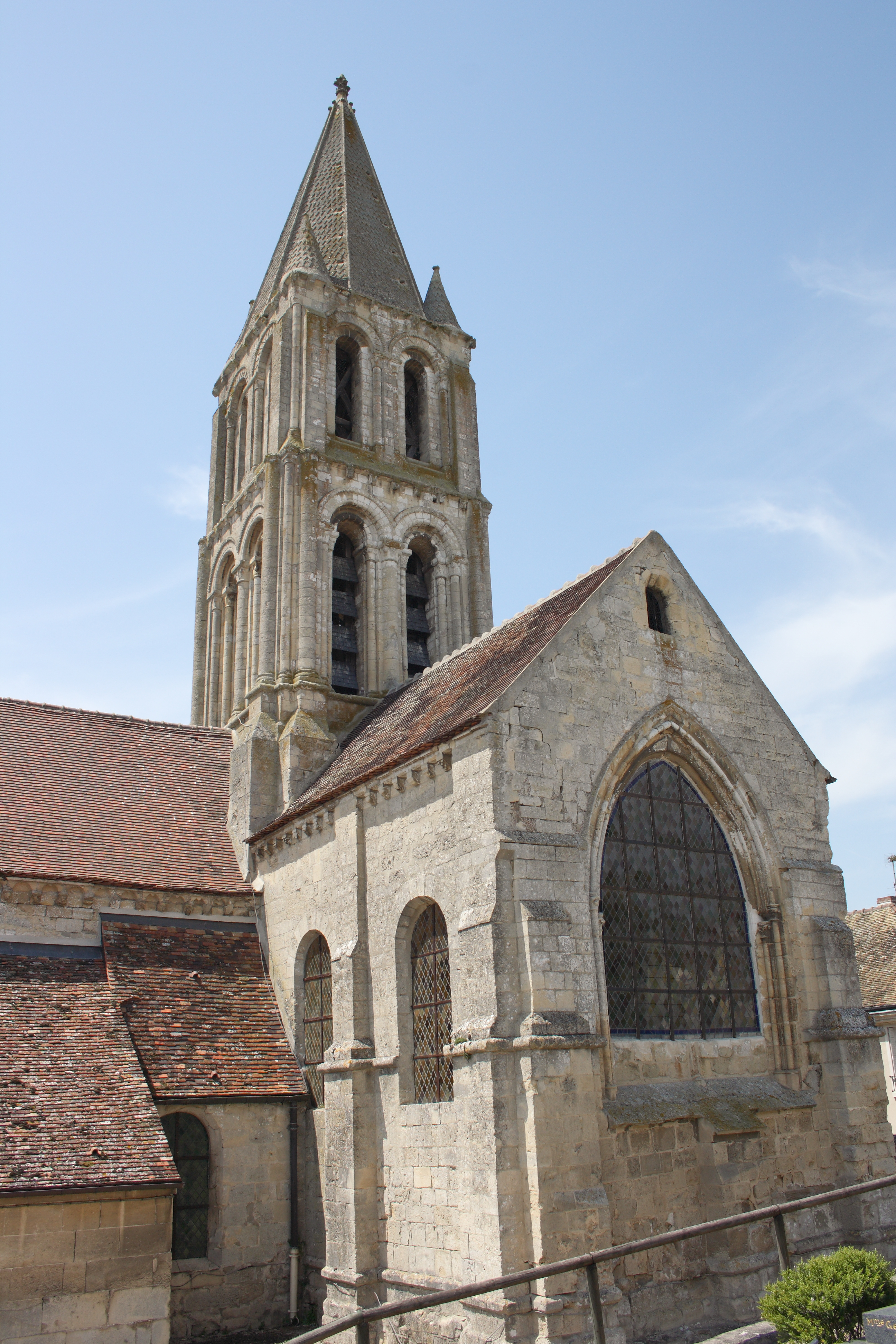 katholische Kirche Saint-Sulpice in Santeuil